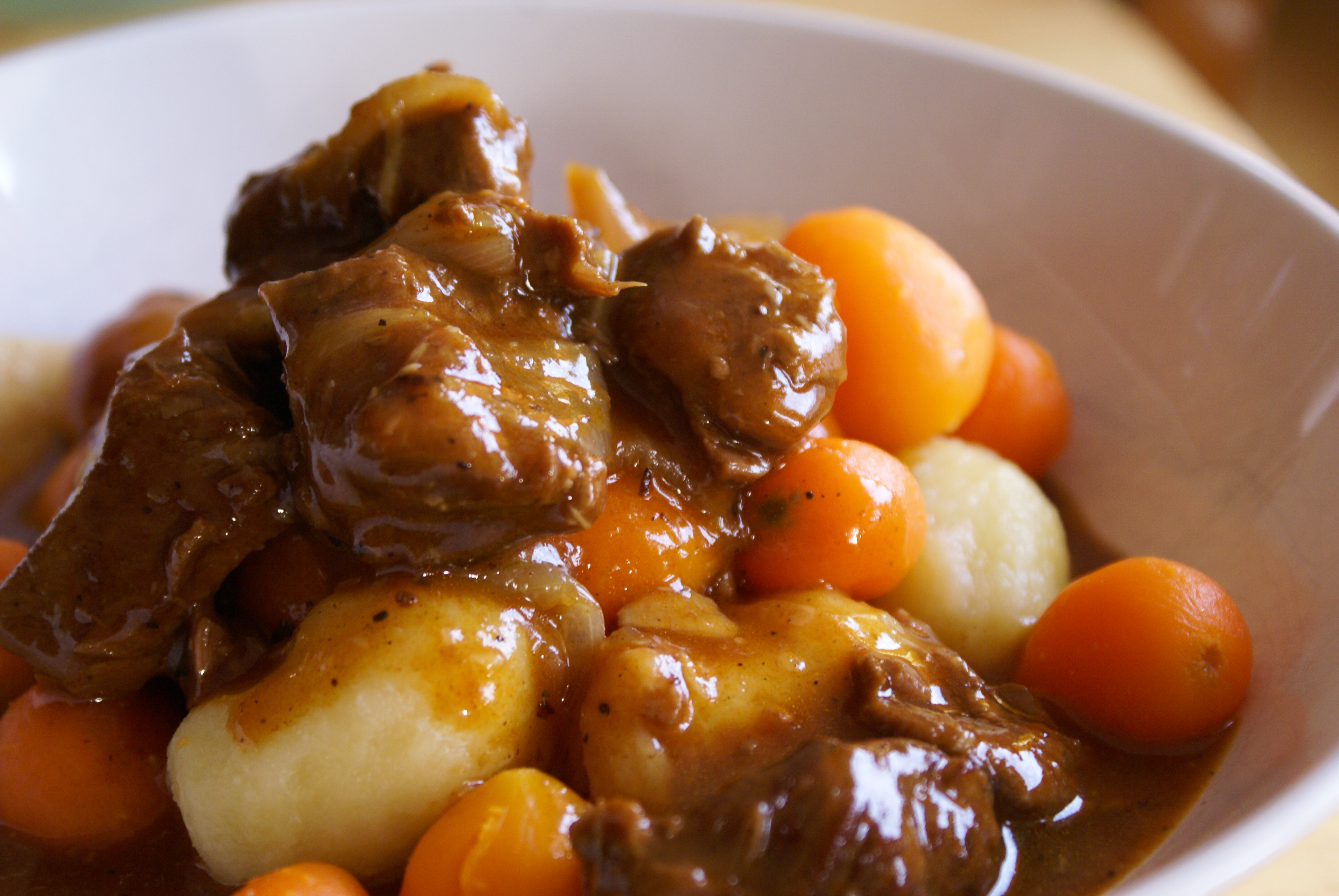 Ragoût de bœuf pommes de terre carottes